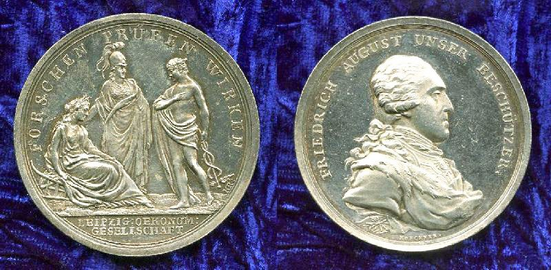 Huldigungsmedaille der Leipziger Ökonomischen Sozietät für Friedrich August III.